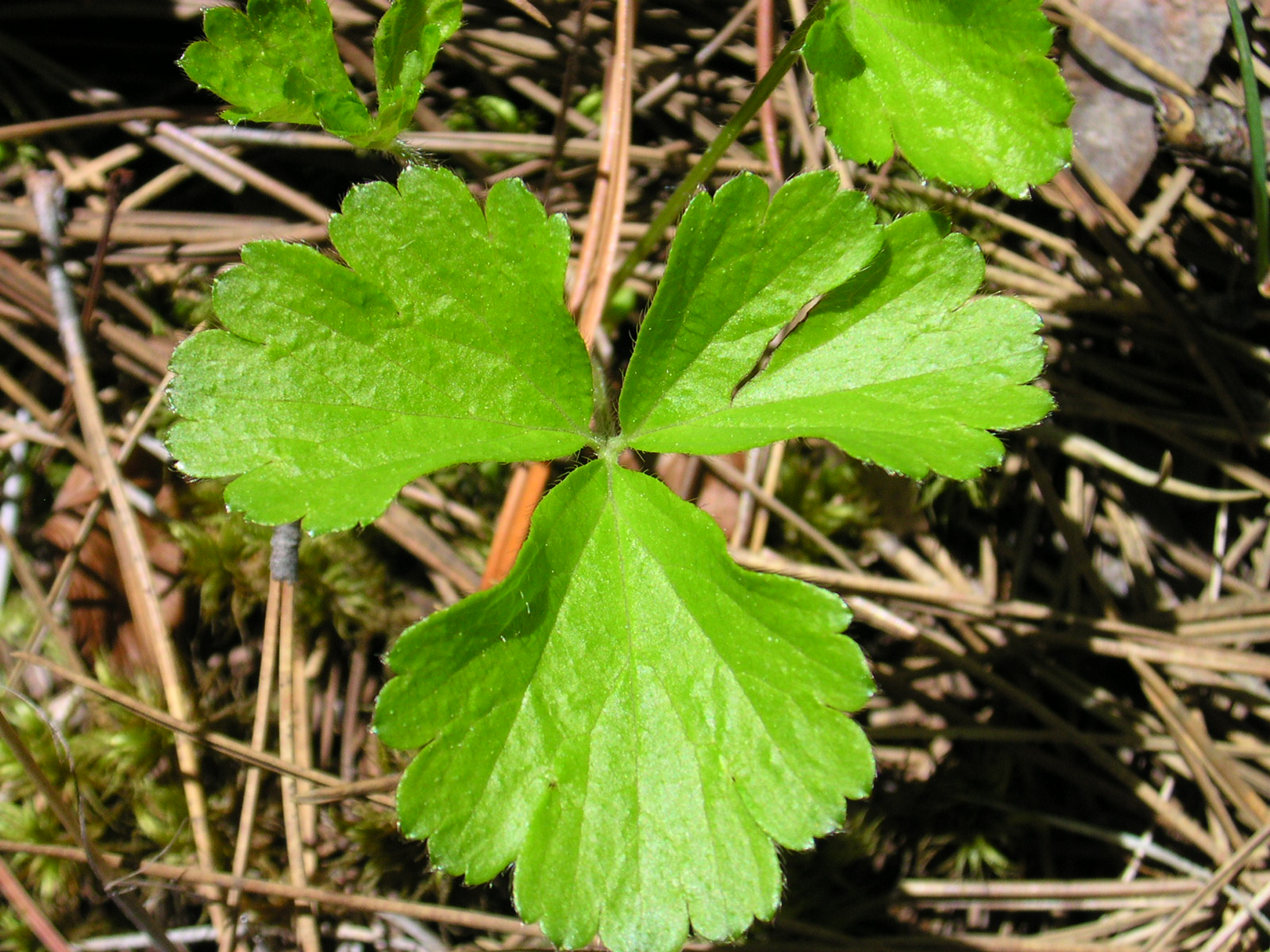 Waldsteinia_fragarioides_16